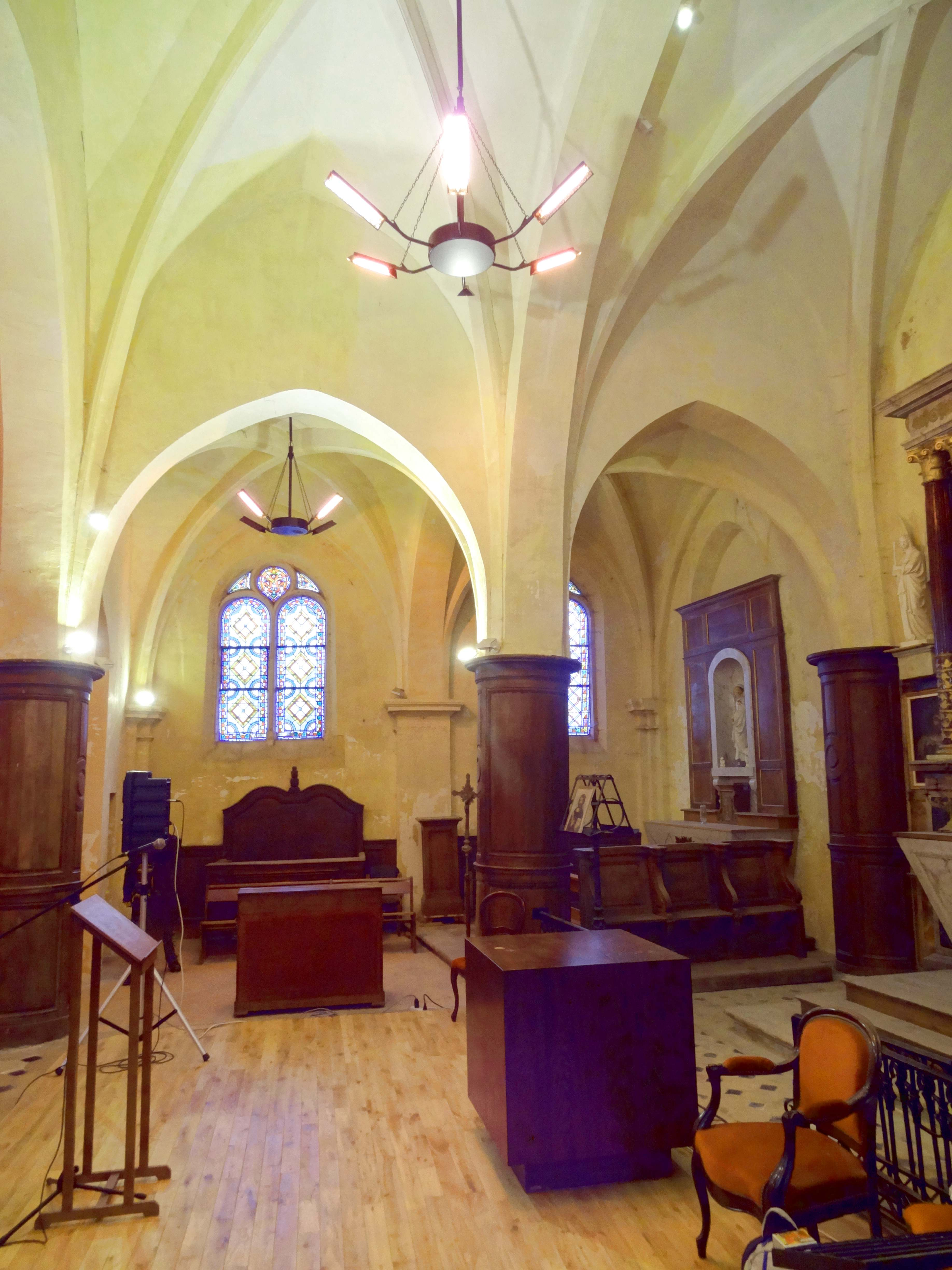 Intérieur de l'église - voir titre.